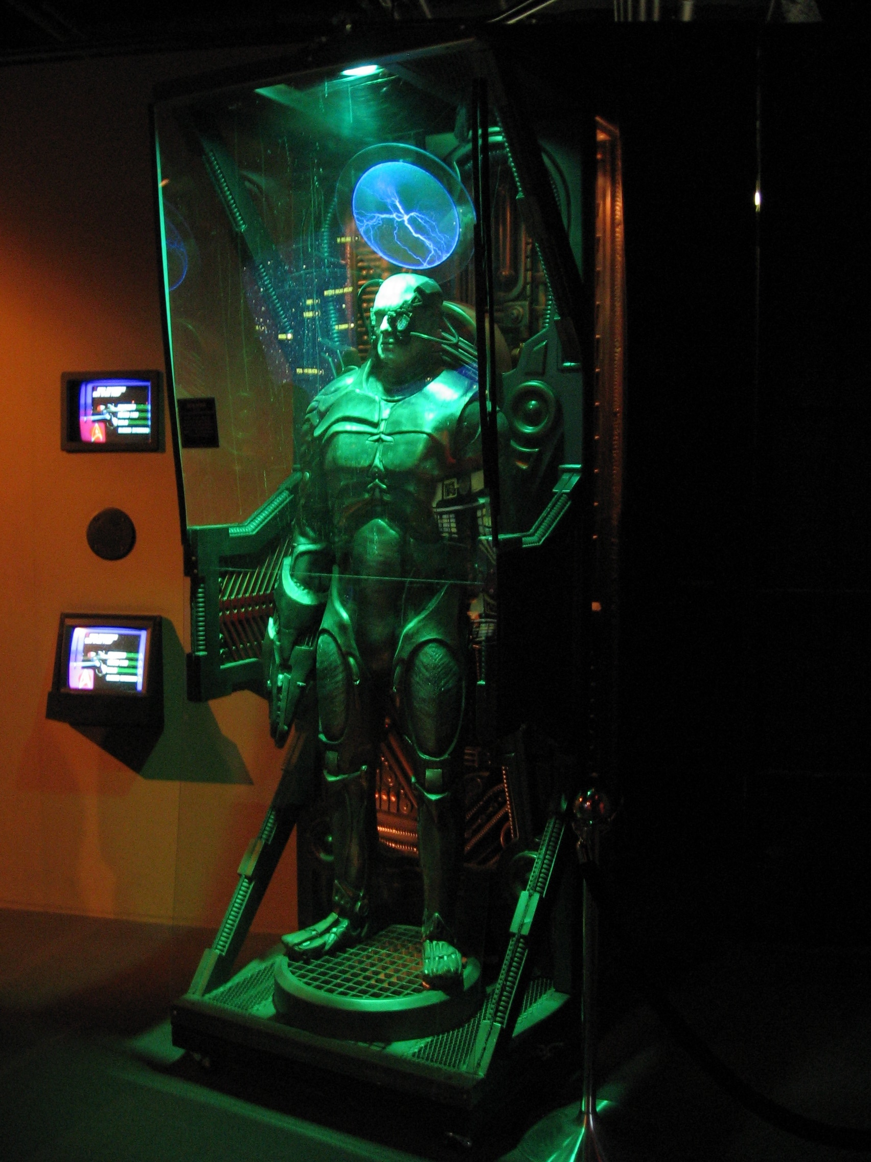 star trek borg docking station